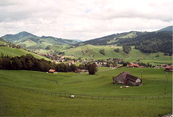 Urnäsch AR, Schweiz